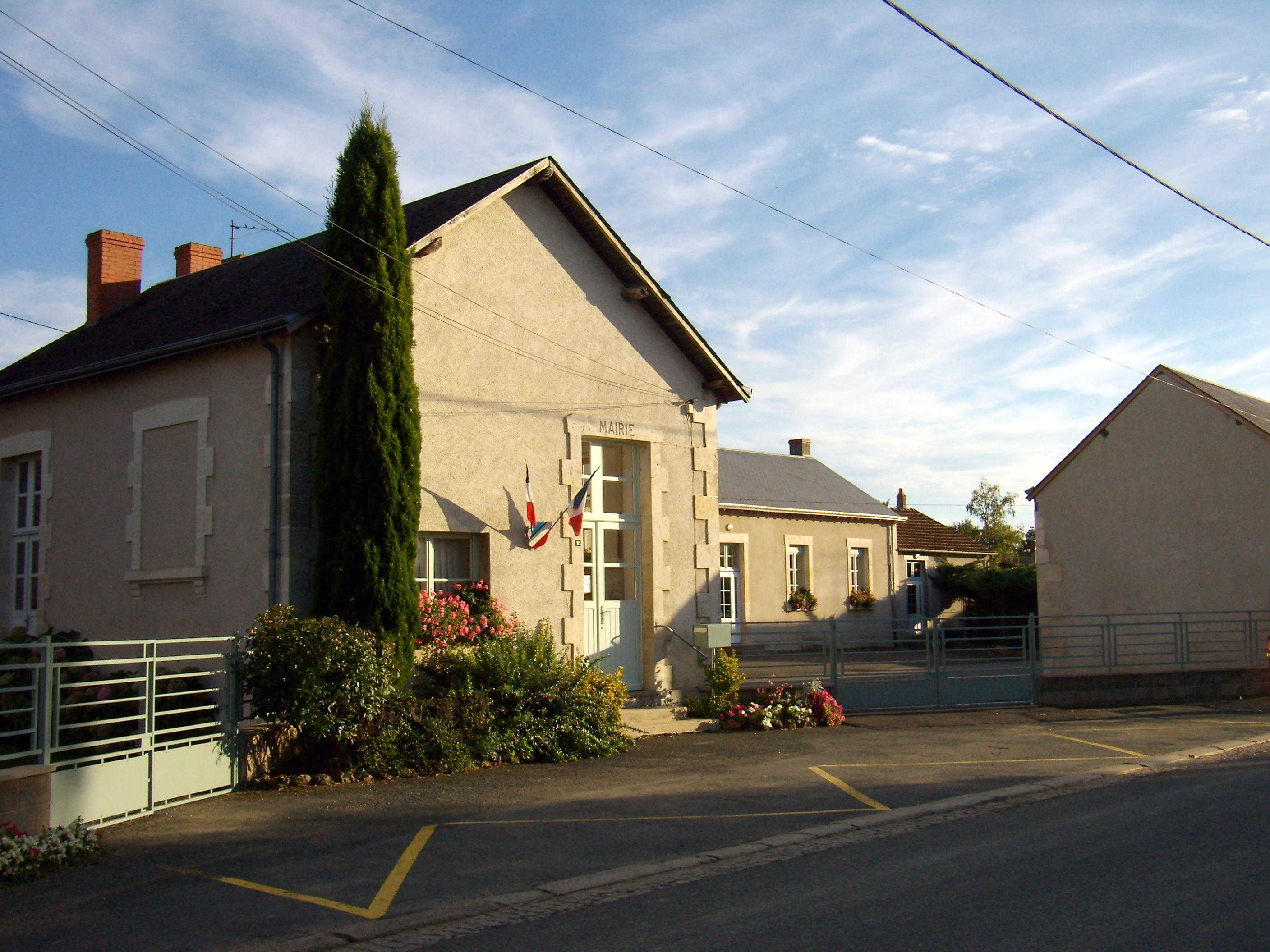 Bouesse - Mairie